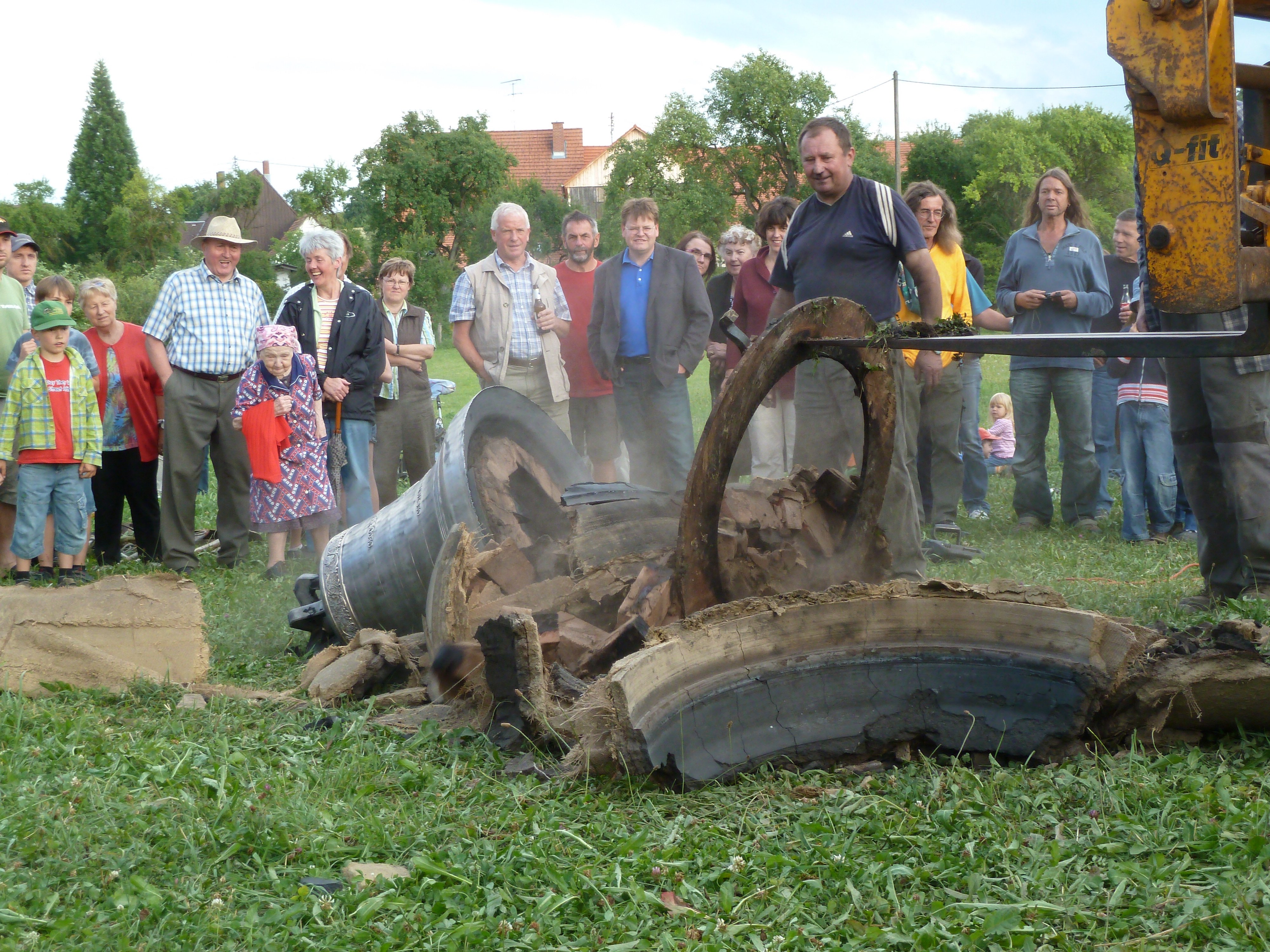 Glockenguss in Ewattingen mit Bruder Michael Reuter von der Abtei Maria Laach